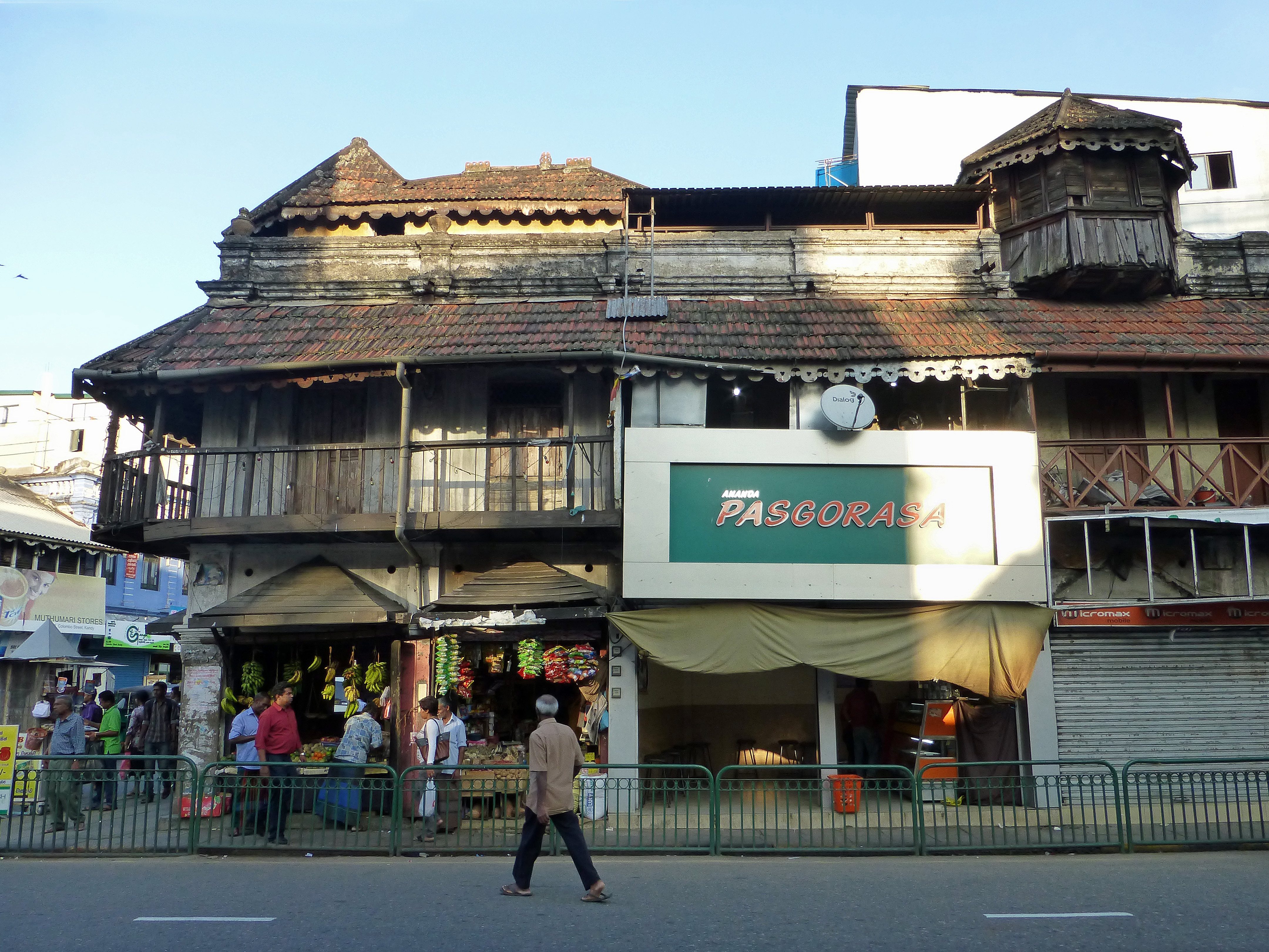 Vieille maison de Kandy (Sri Lanka) - This is Giragama Walawwa on Yatinuwara Street, Kandy (taken prior to the building's restoration in 2014)